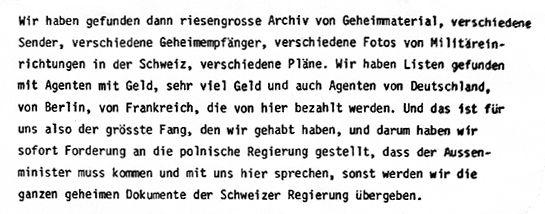 Gesprächsprotokoll Verhandlungsführer und Geiselnehmer Botschaft VR Polen in Bern 1982